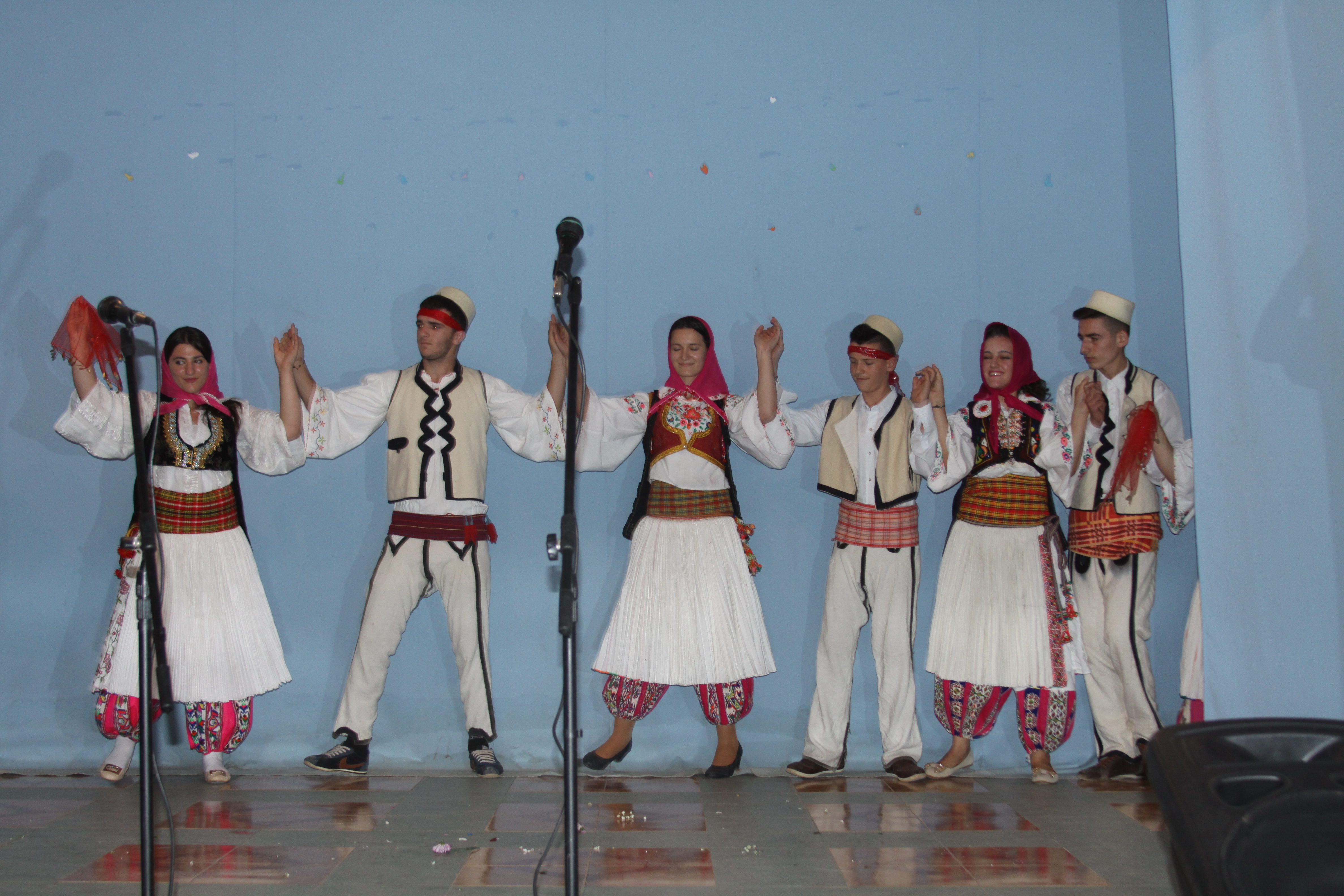 Valltaret e Sh. Mesme Bicaj